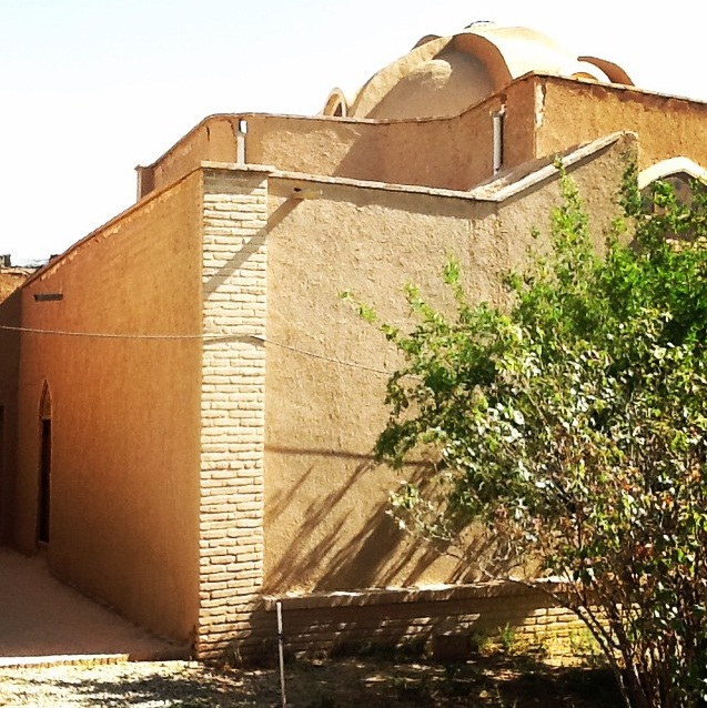 This is a view of outside of an old house in a village called Kahak (near the city of Qom, Iran) where Mulla Sadra used to live in when he was exiled due to some of his ideas.